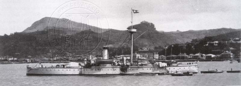 Фото корабля "Сайен"